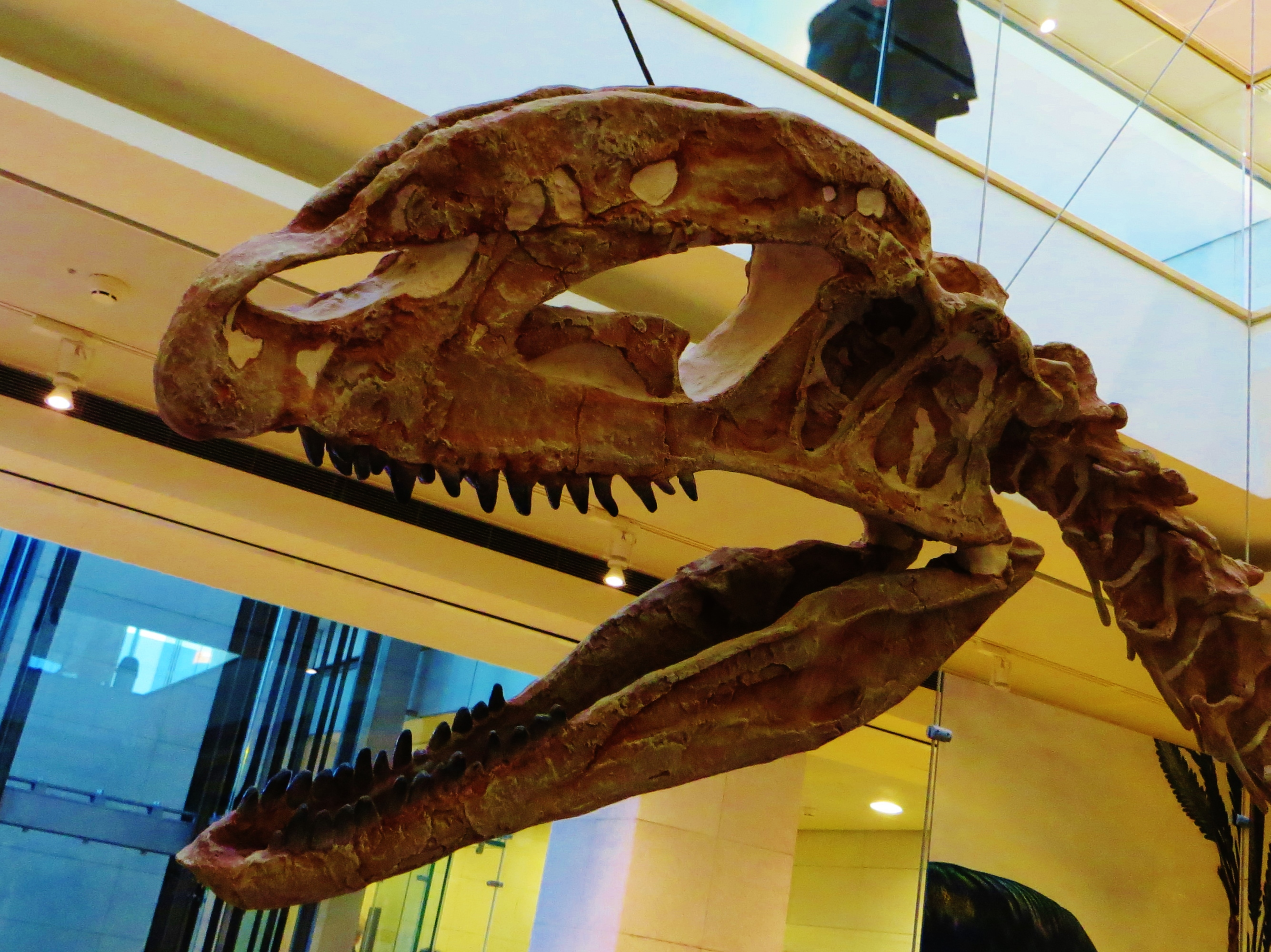 Fossil of Sinosaurus, an extinct reptile- Took the picture at Muse (Trento)